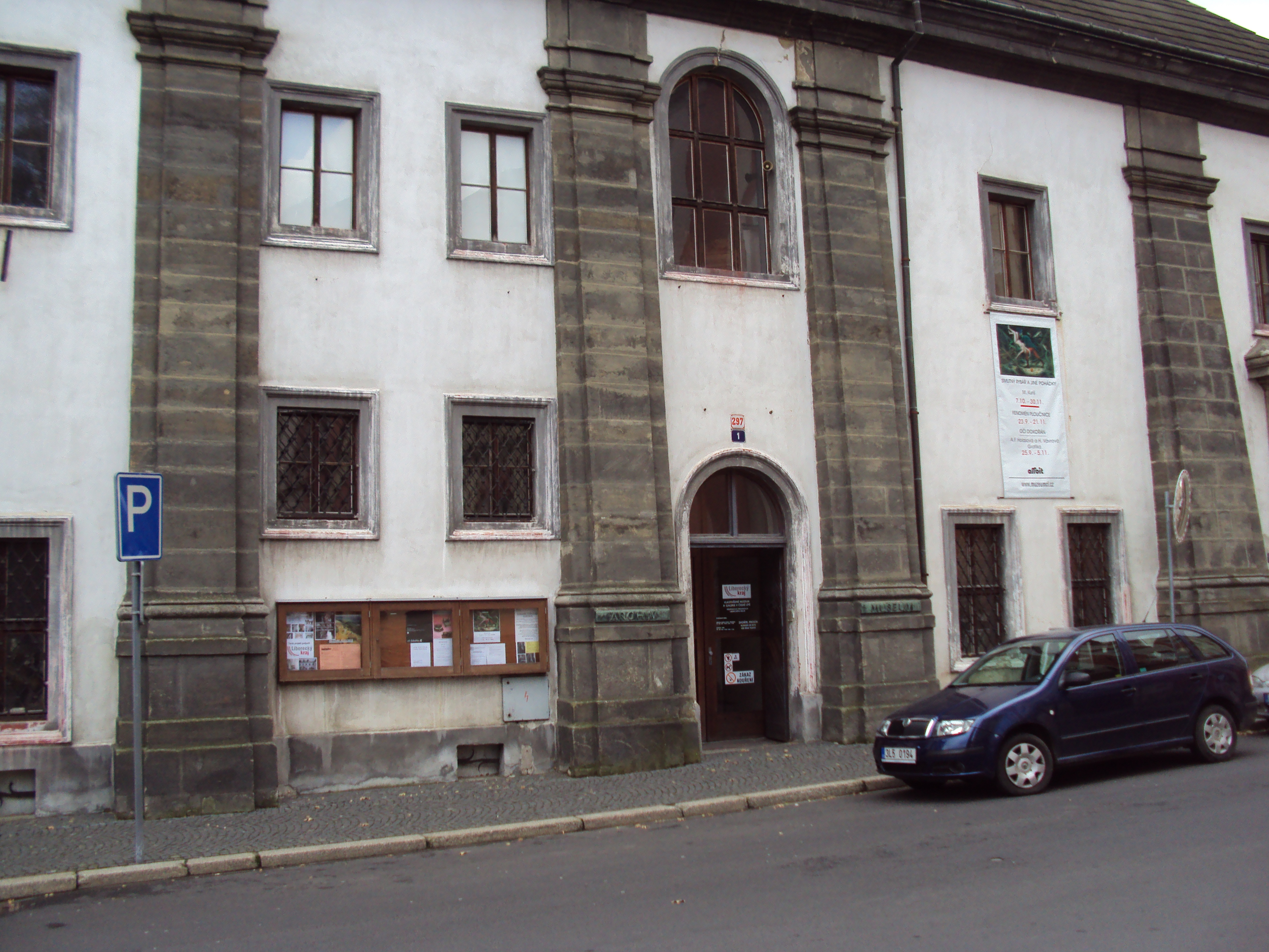 Vlastivědné muzeum je v budovách někdejšího kláštera